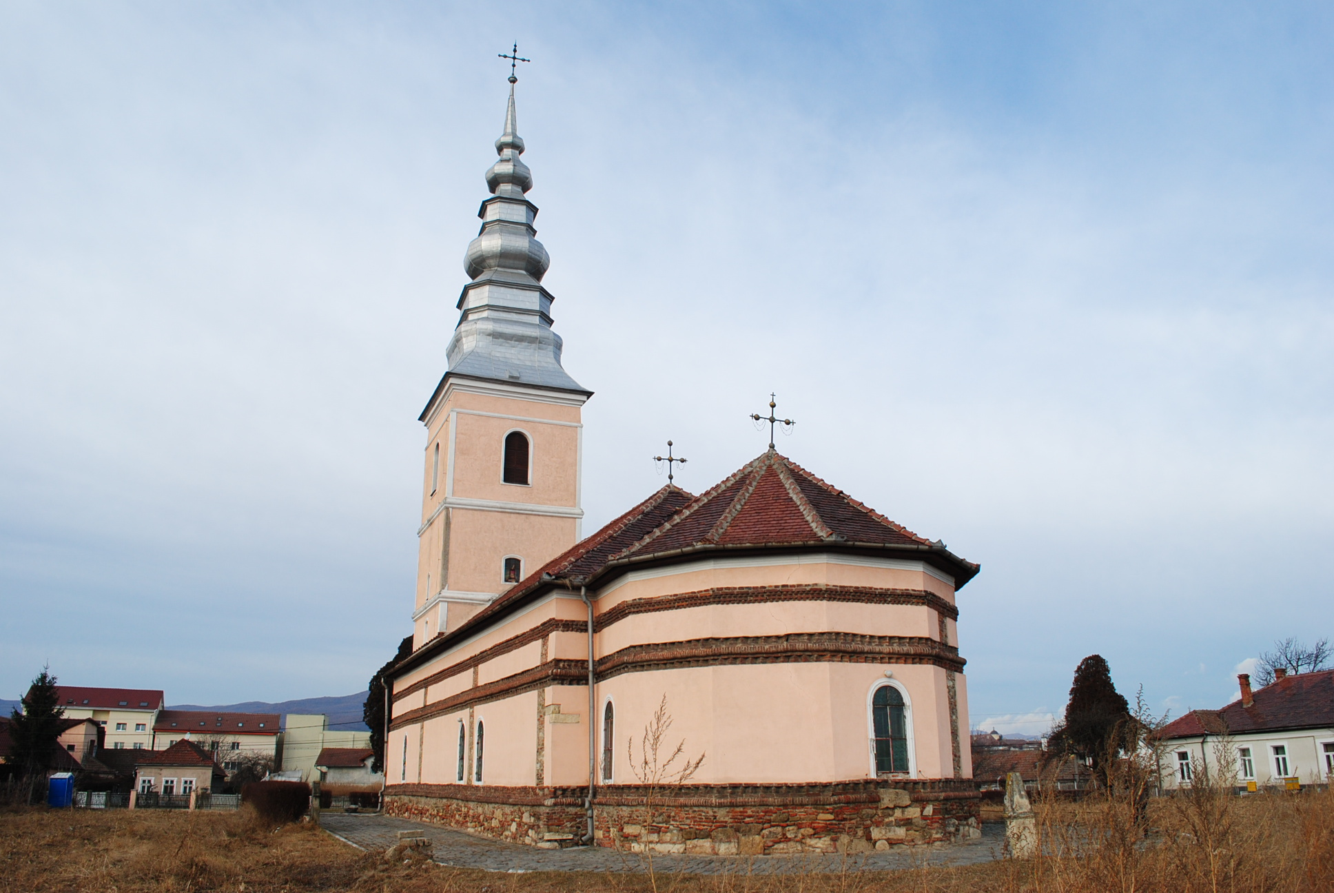 Biserica "Sf. Treime" (Maieri II) 1713-1715